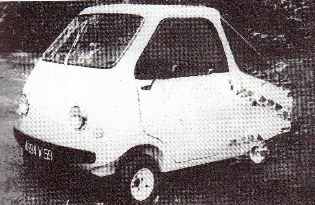 gGMT Rivelaine 1981